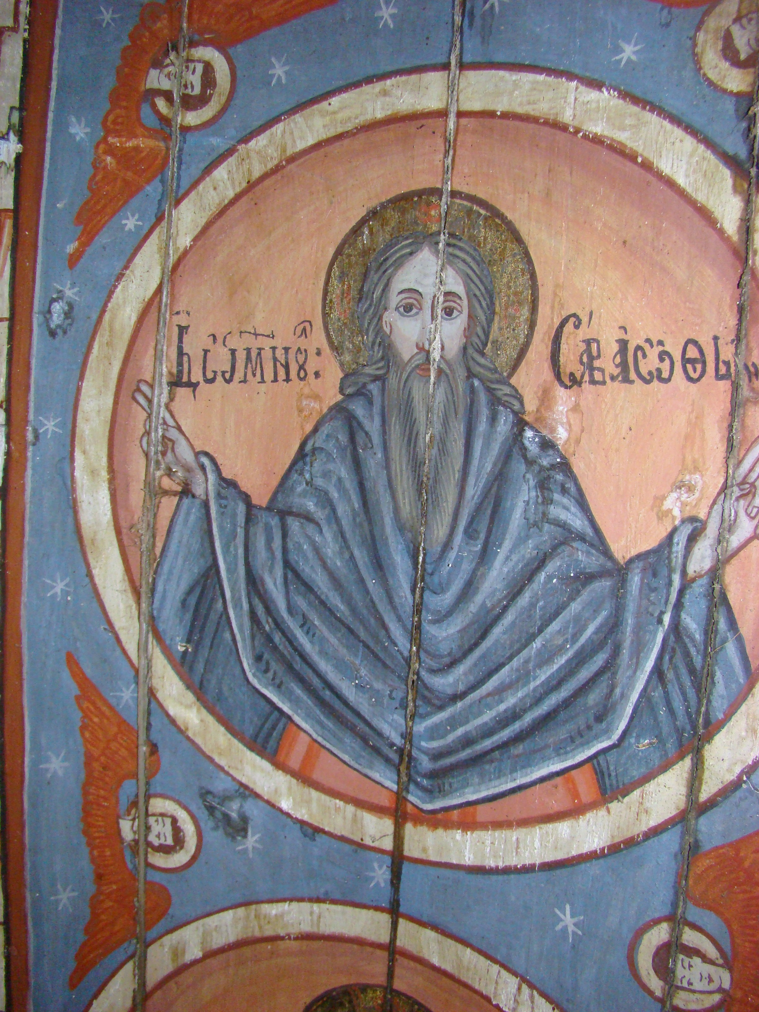 Edicul „Osuar” cu pictură pe pânză